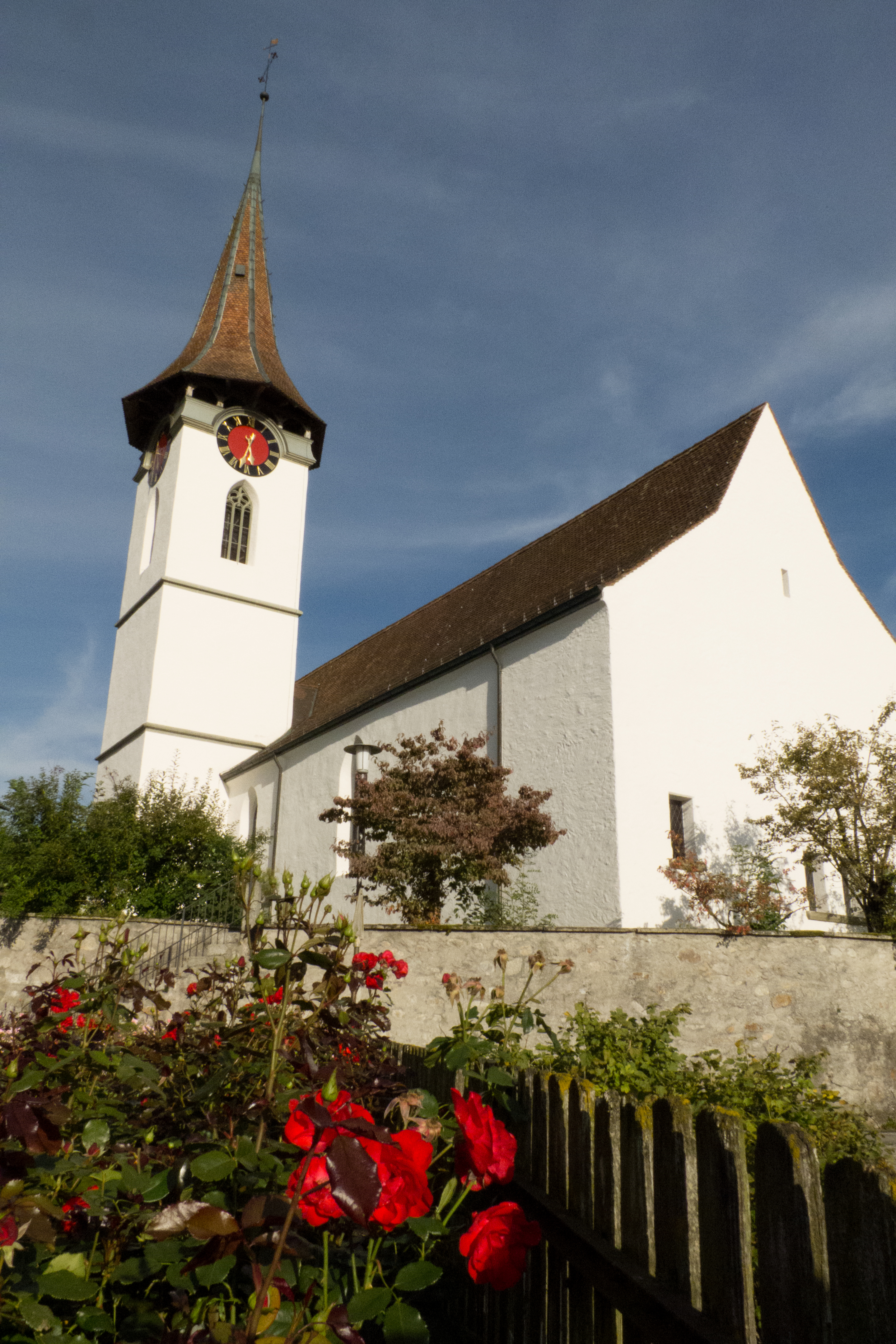 Kirche Biglen, mit Rosen